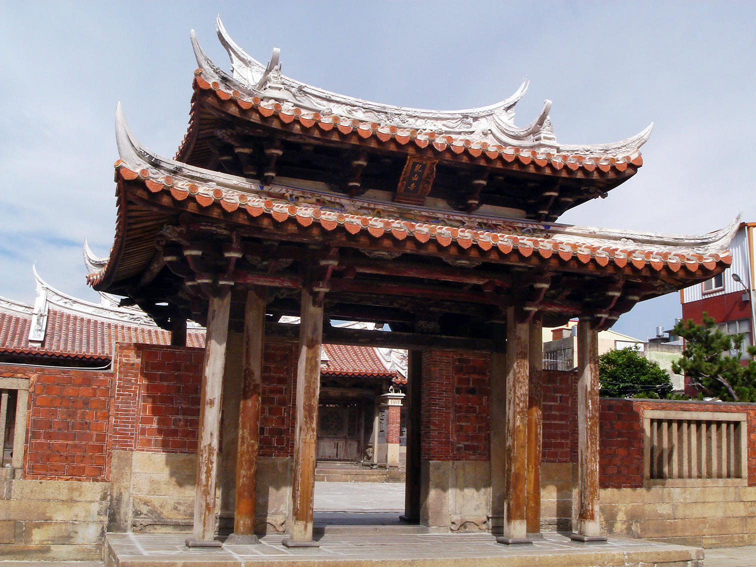 鹿港龍山寺山門